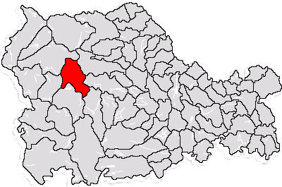 Fişierul a fost creat după o imagine a judeţului Neamţ din domeniul public.